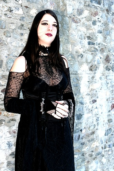 Mistabys, modèle Suisse, décembre 2005.